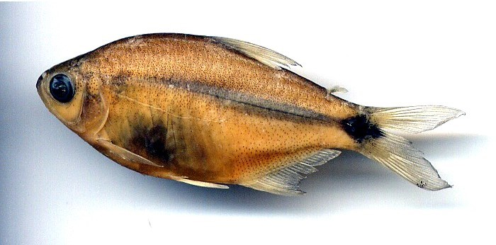 Hypesobrycon proteus